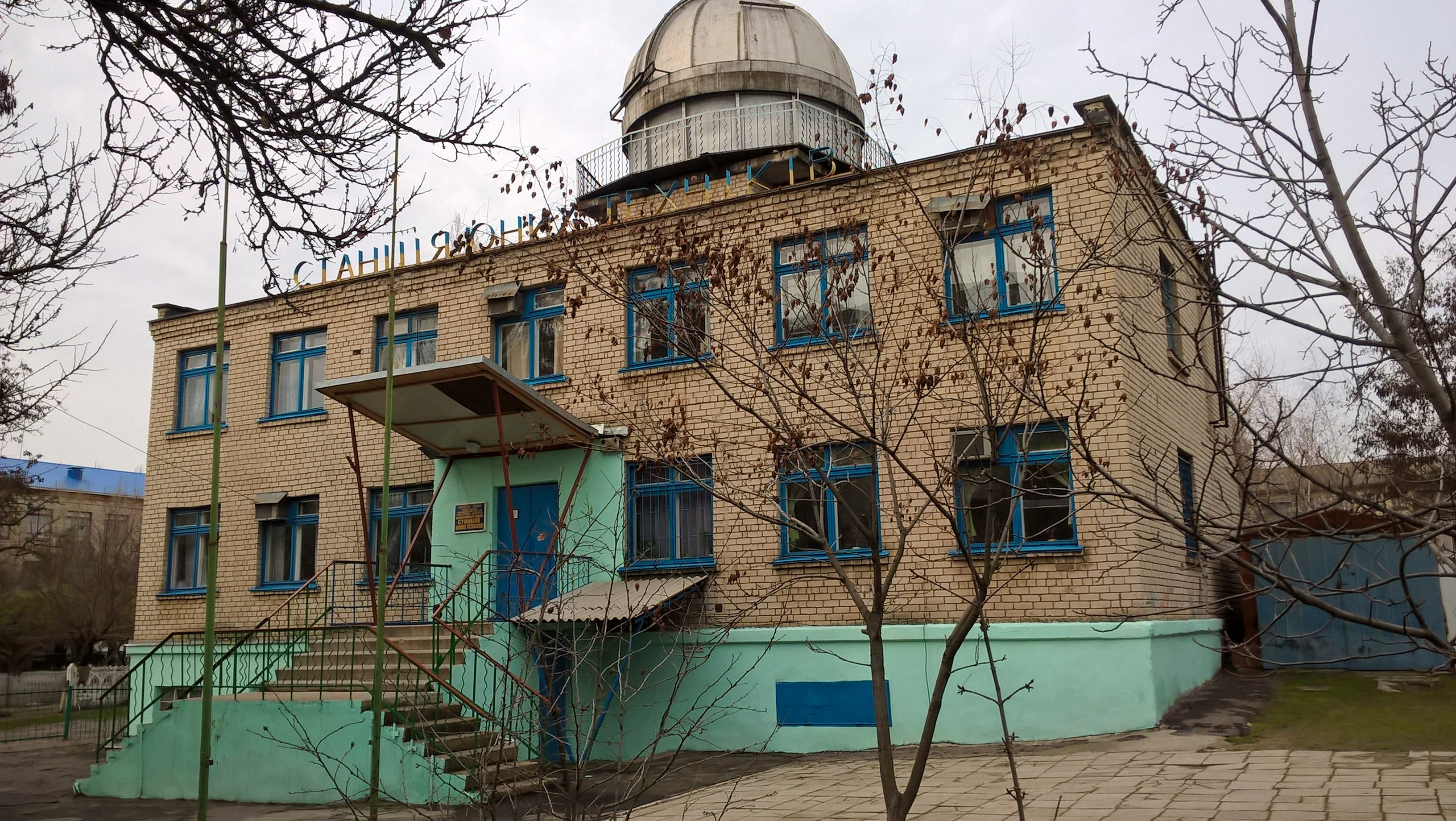 Станція юних техніків Нової Каховки